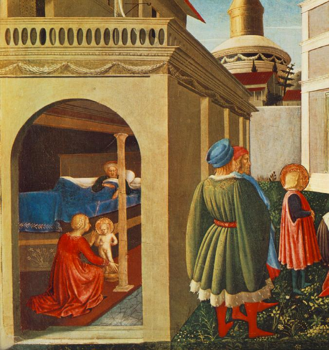 detail